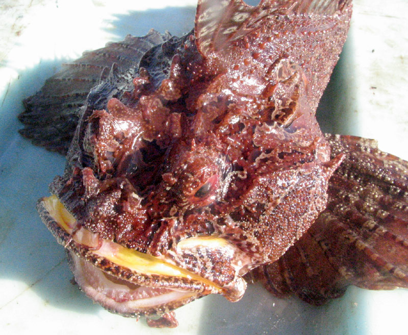 Hémitriptère fraîchement sorti de l'eau, non loin des îles-de-la-Madeleine. Photo prise par Matthieu Godbout pendant l'automne 2006.